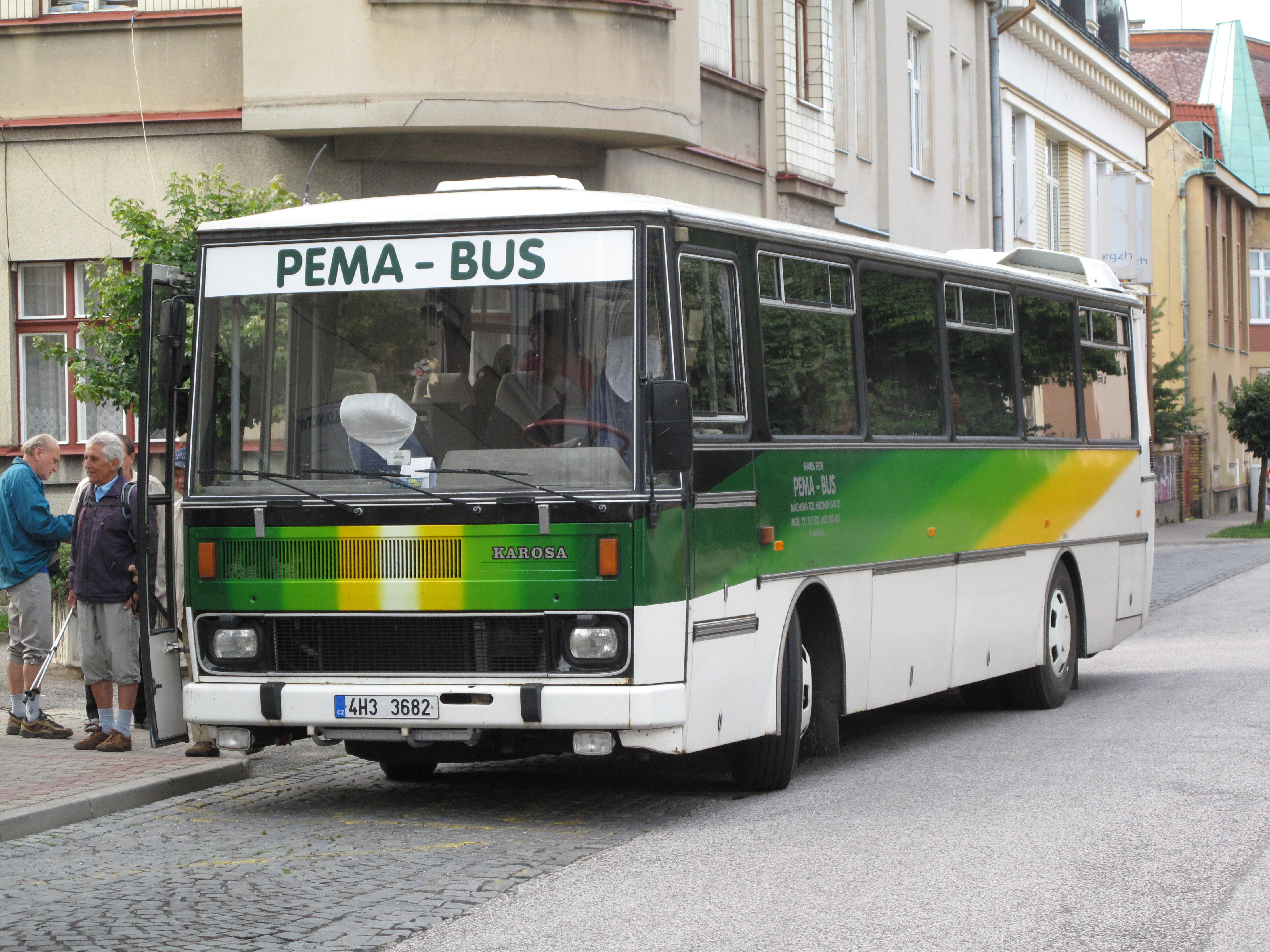 Karosa v Hronově